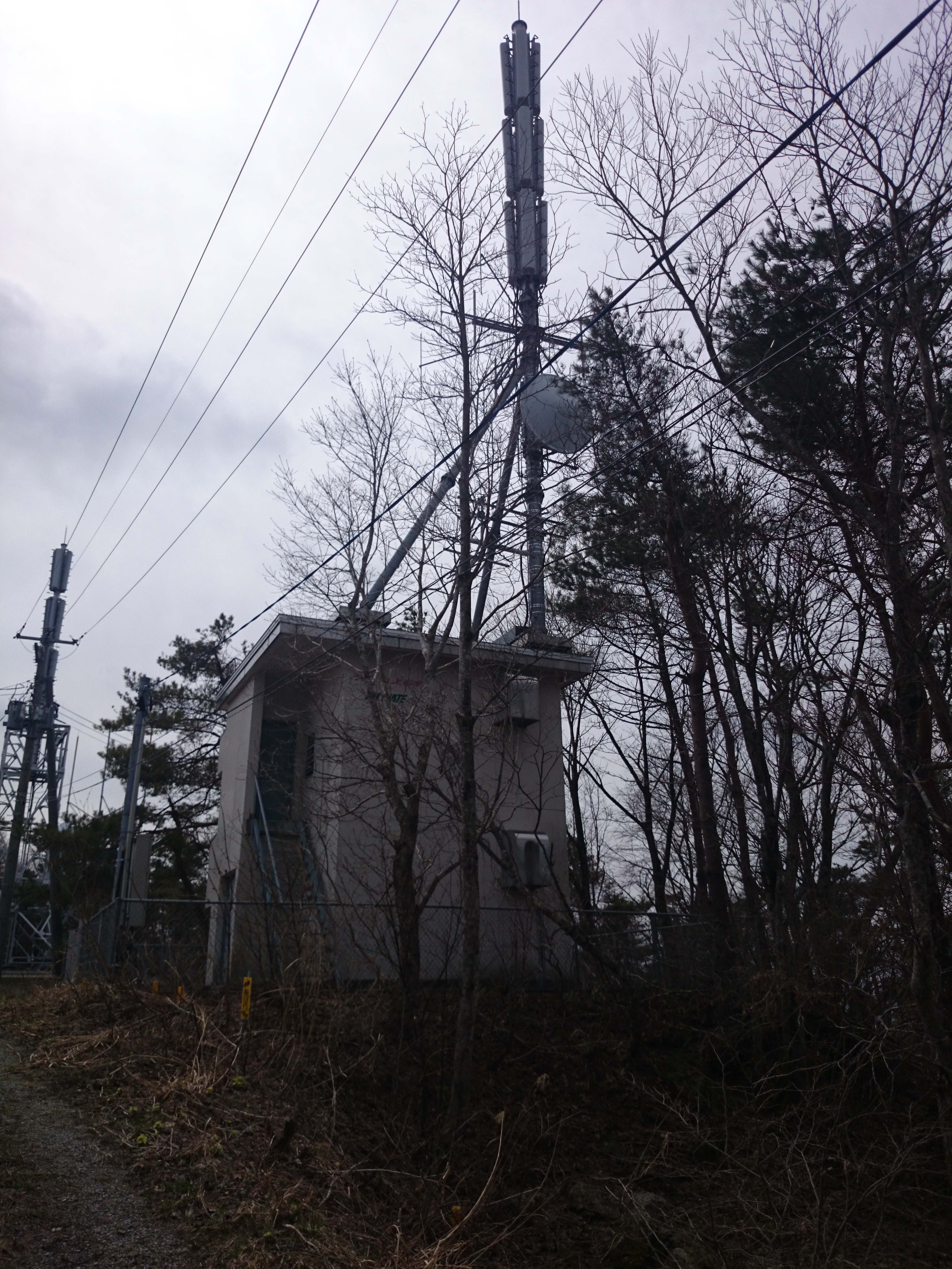 TVI・IBC・FM岩手一関送信所